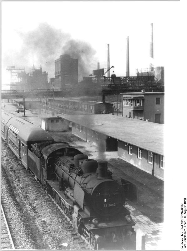 ADN-ZB-Zühlsdorf-Schmidt 6.8.1958 Frö-Schm Veb Leuna-Werke UBz.: Blick auf den Werkbahnhof.